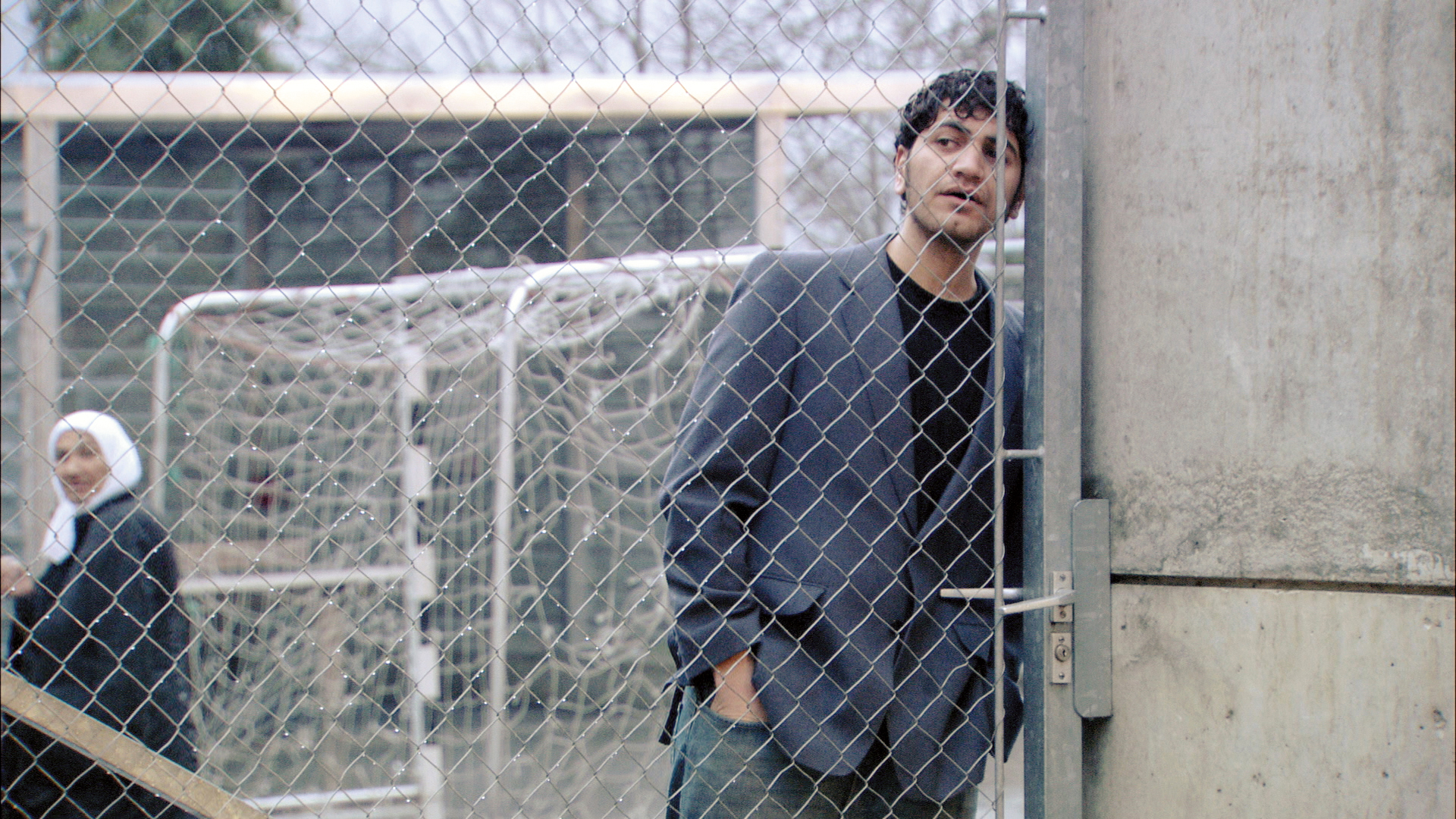 Fahad dans la cour du centre d’enregistrement et de procédure pour requérant d’asile de Vallorbe. Image tirée du film « La forteresse » de Fernand Melgar